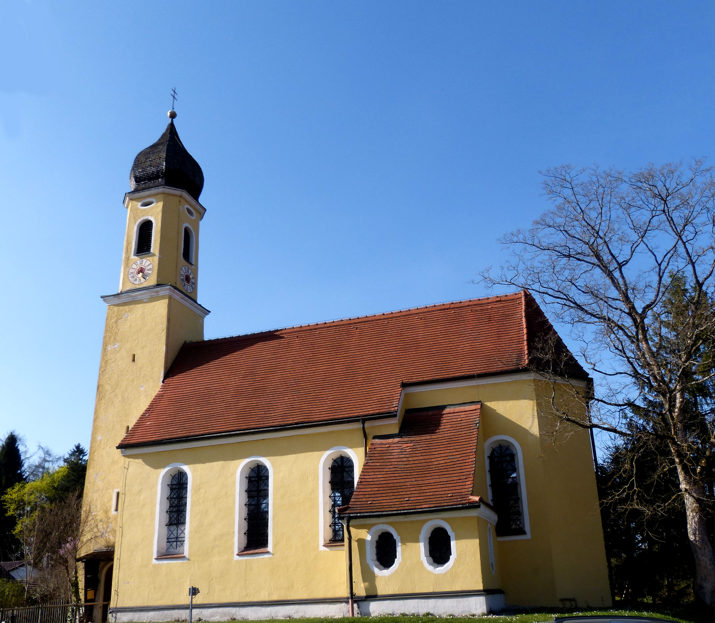 Berg am Starnberger See, OT Allmannshausen, Kirche St. Valentin. Die katholische Filialkirche war bis ins 19. Jahrhundert eine Wallfahrtskirche. Das kleine barocke Bauwerk stammt aus dem Jahre 1651, das Turmuntergschoß aus dem 15. Jahrhundert.